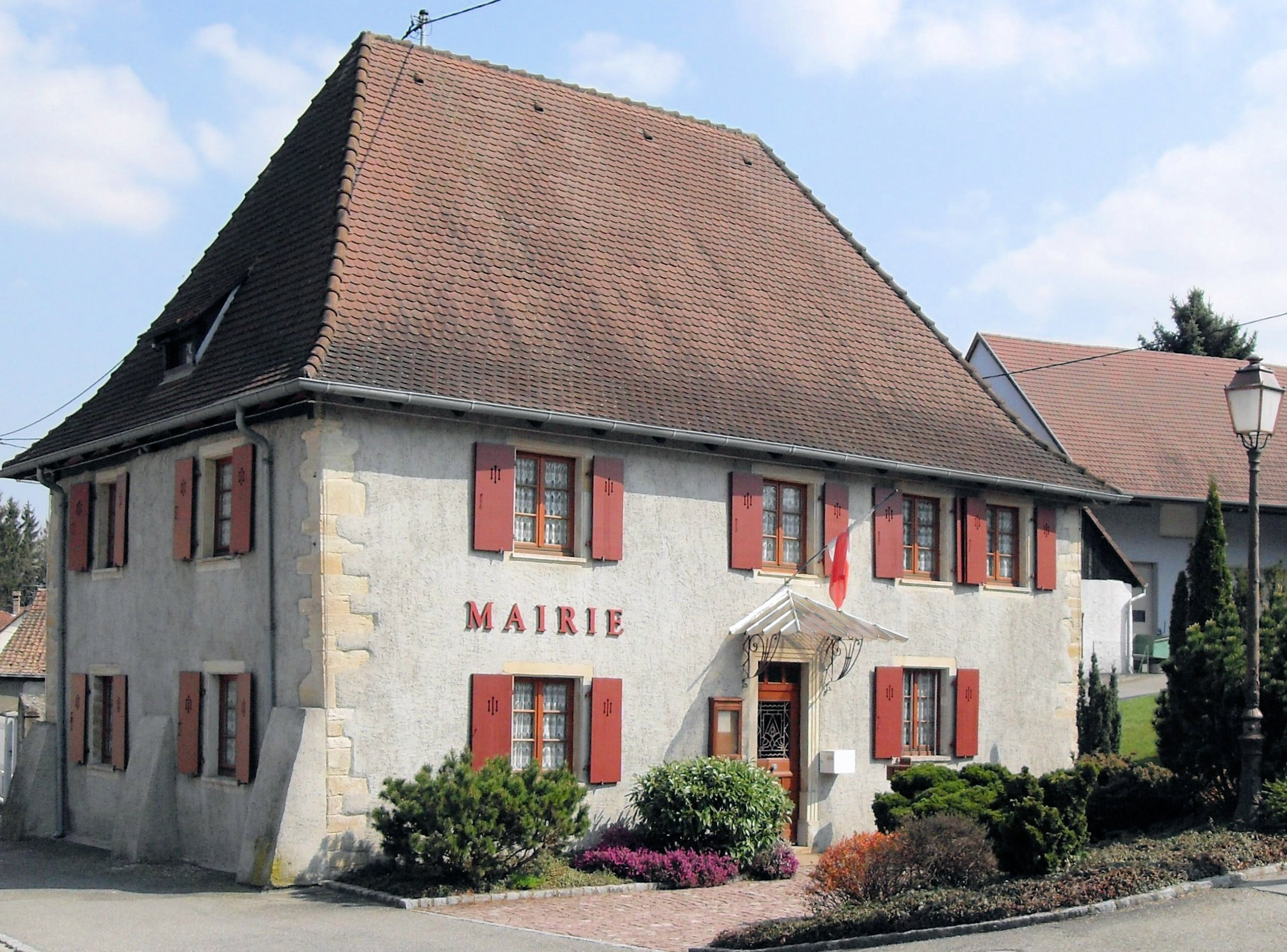 La mairie de Steinbrunn-le-Bas